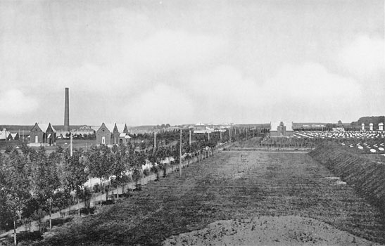 137. Рублевская насосная станцiя. Машинное зданiе и англiйскiе фильтры.